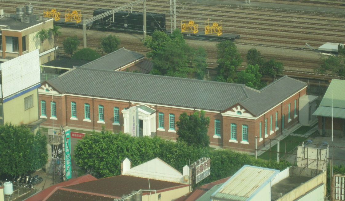 中文（台灣）: 自高樓拍攝的原臺灣總督府專賣局臺南支局臺南出張所